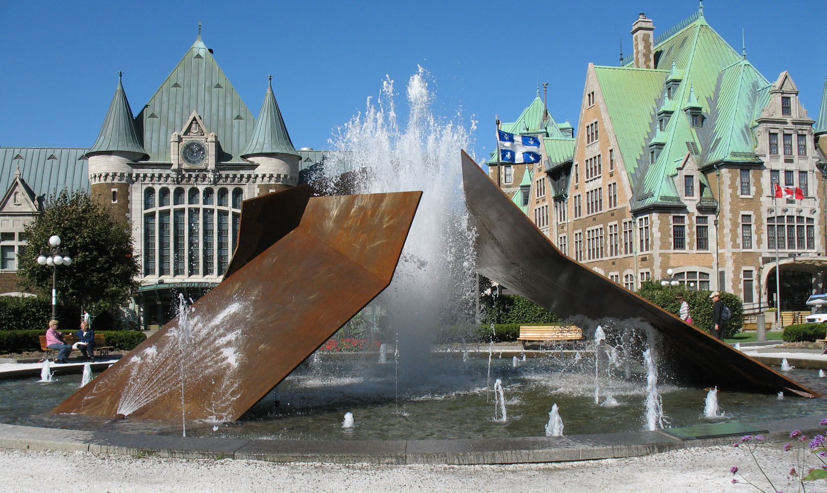 Gare du Palais et la sculpture-fontaine Éclatement II, de Charles Daudelin,1999, à Québec qui rappelle la sculpture Embâcle, installée à Paris en 1984.